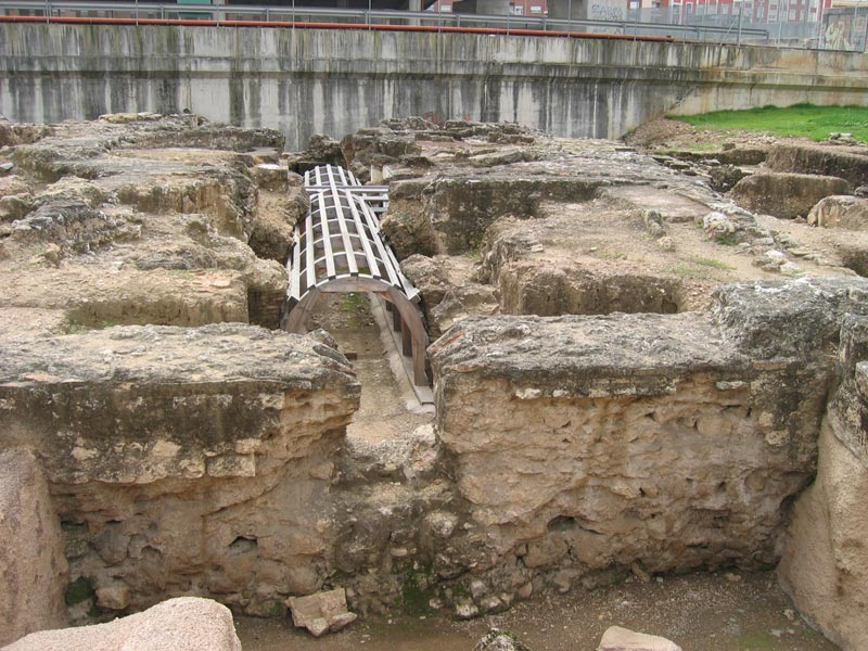 Yacimiento arqueológico de Cercadilla, en Córdoba (España). Vista parcial de lo excavado.